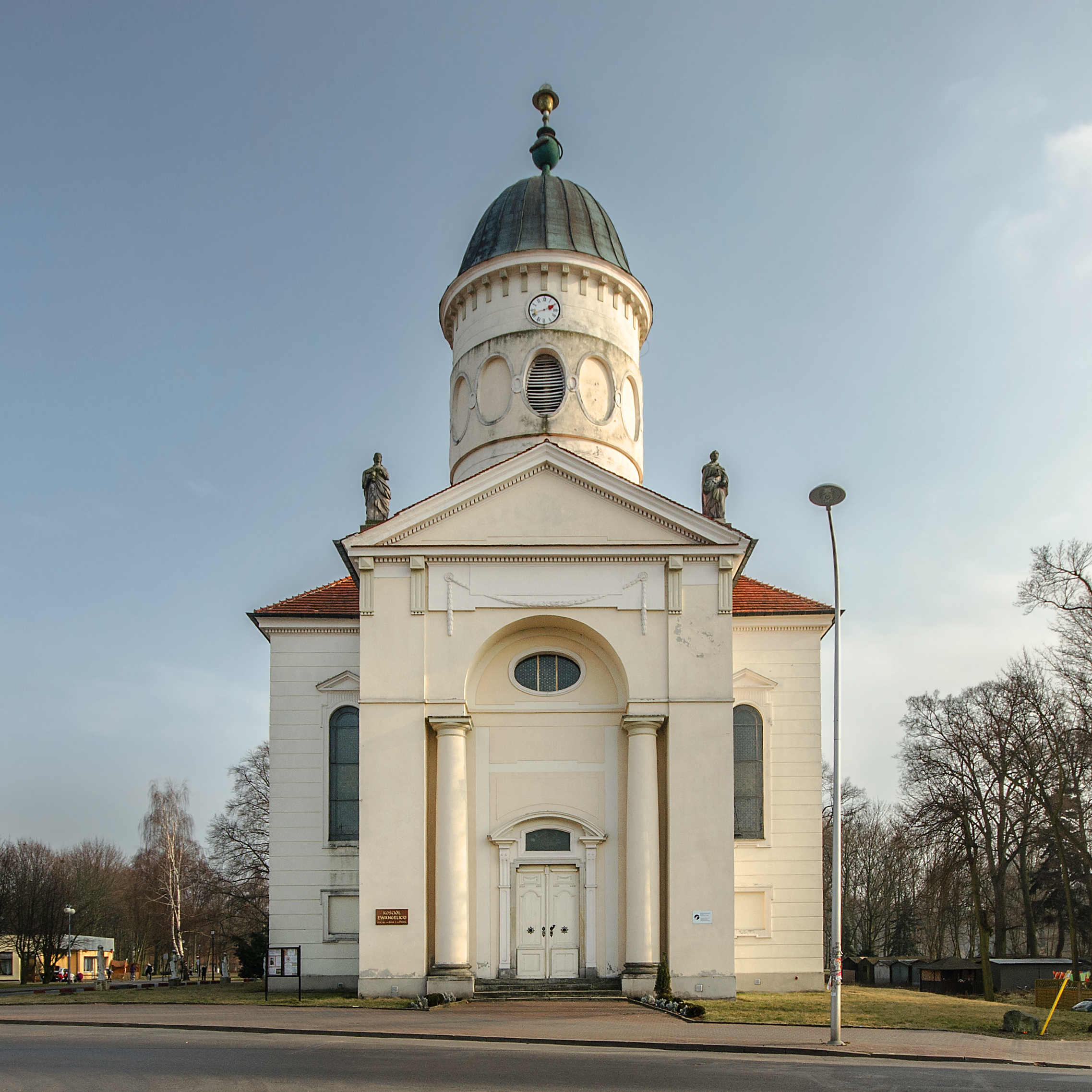 Syców, kościół ewangelicki, 1785-1789